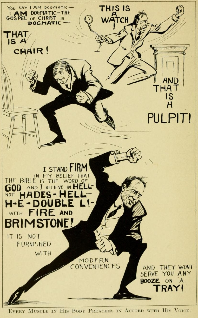 the page from the book of William T. Ellis: Billy Sunday: Tne Man and His Message. Philadelphia, PA: John C. Winston Co., 1914, p. 148.